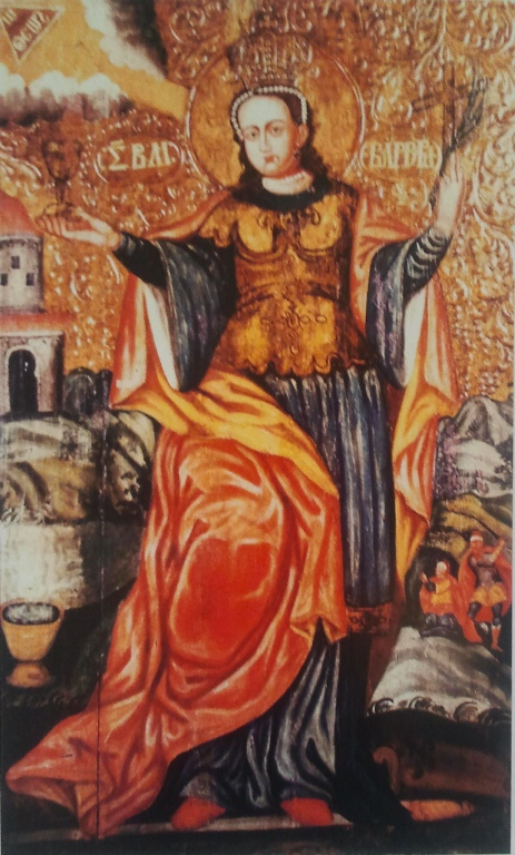 Святая Варвара Полесье, вторая треть XVIII в. Из Крестовоздвиженской церкви г. Лунинец Брестской обл